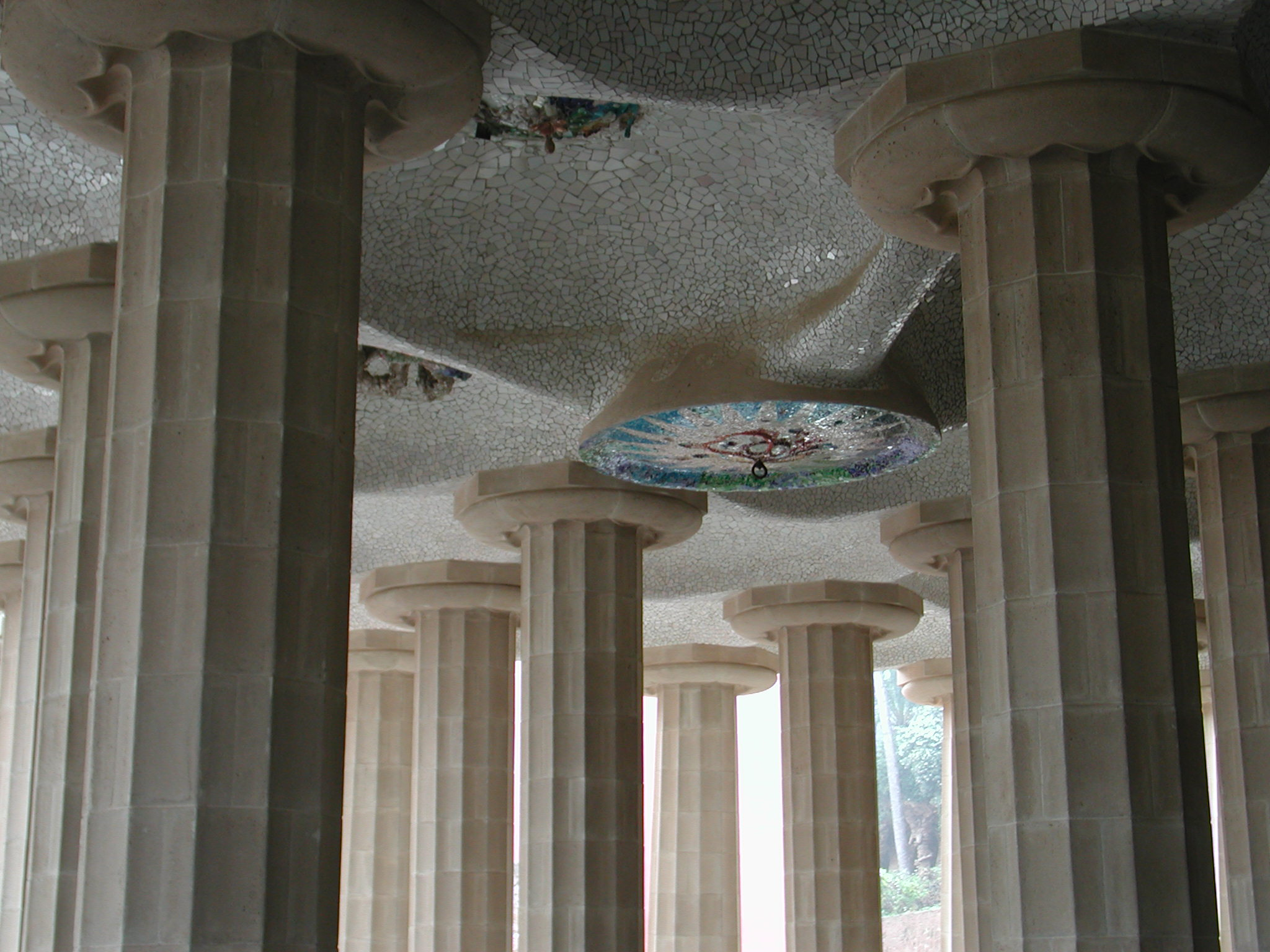 Parc Güell, Barcelona